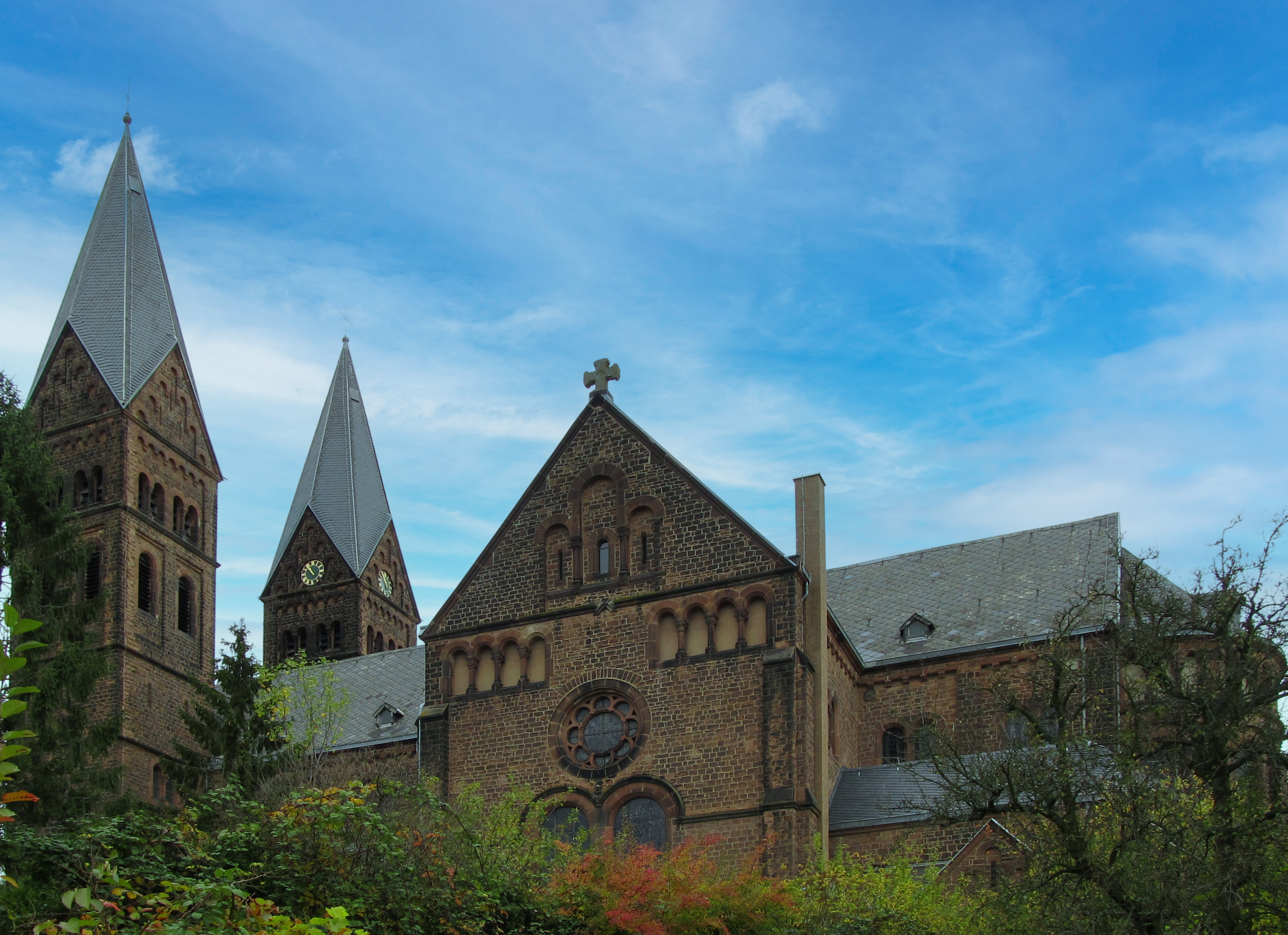 Die katholische Pfarrkirche St. Sebastian in Püttlingen, Saarland